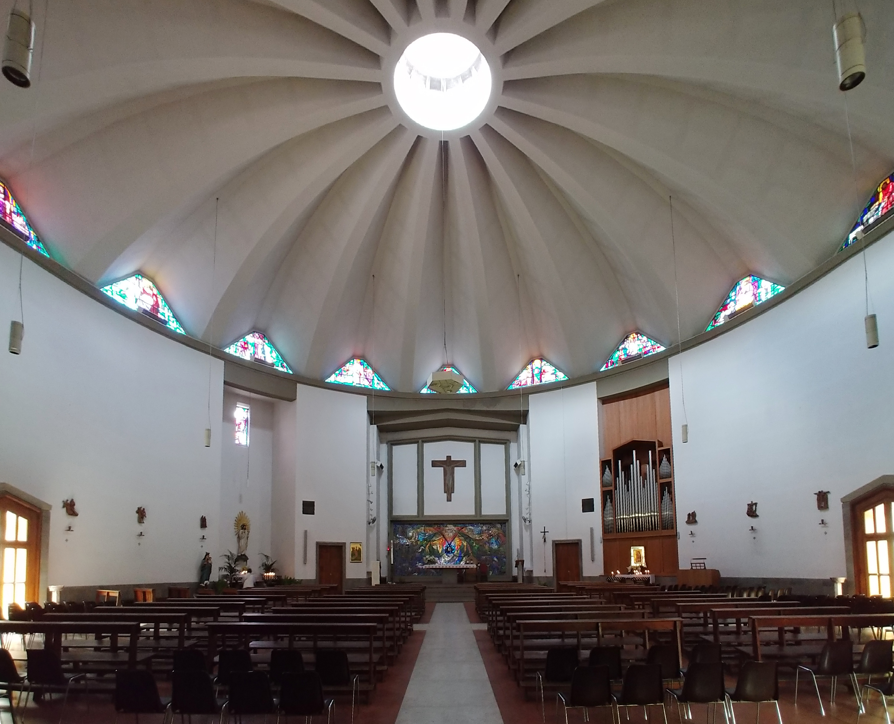 Interno.